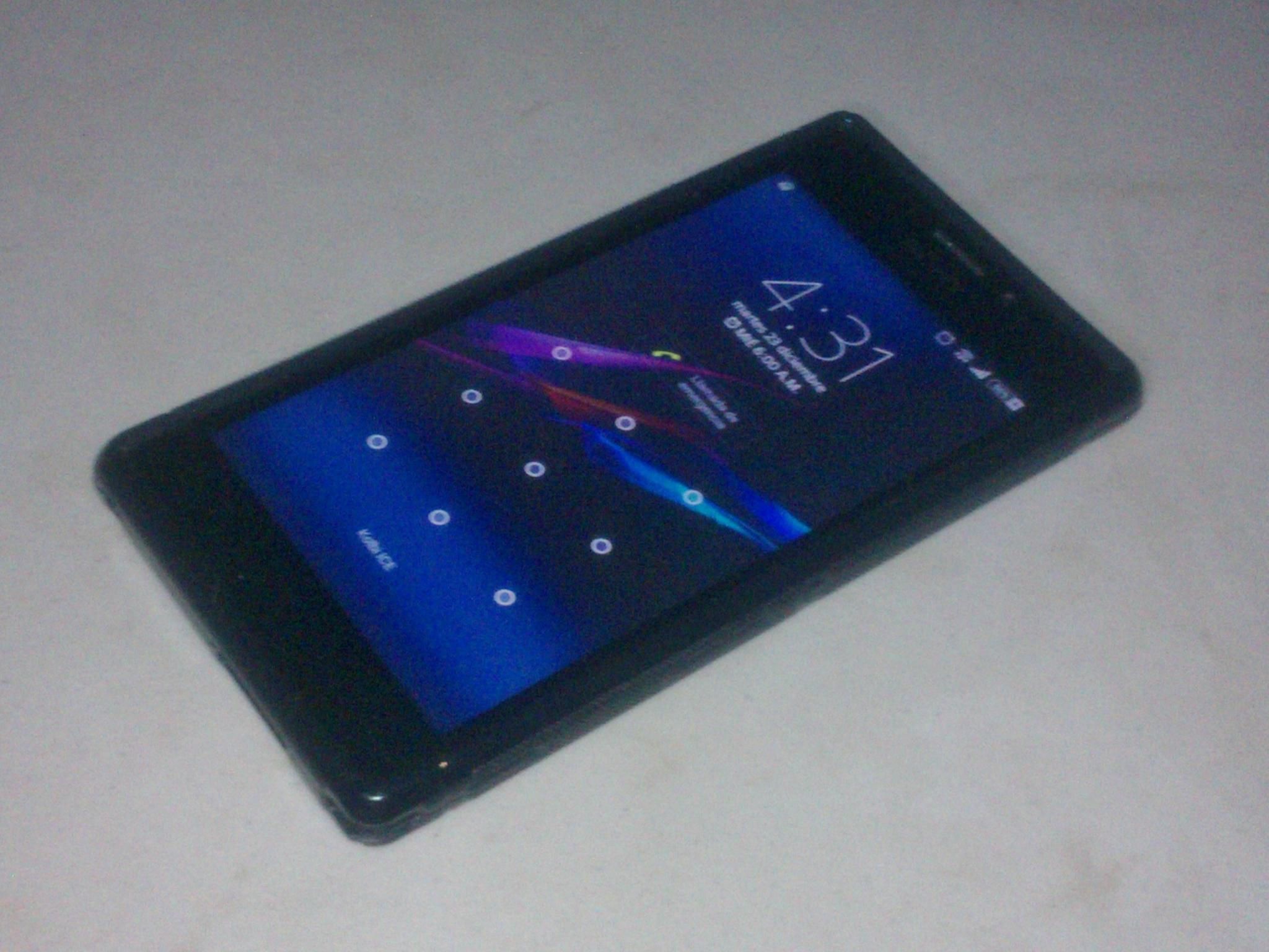 Sony Xperia M2